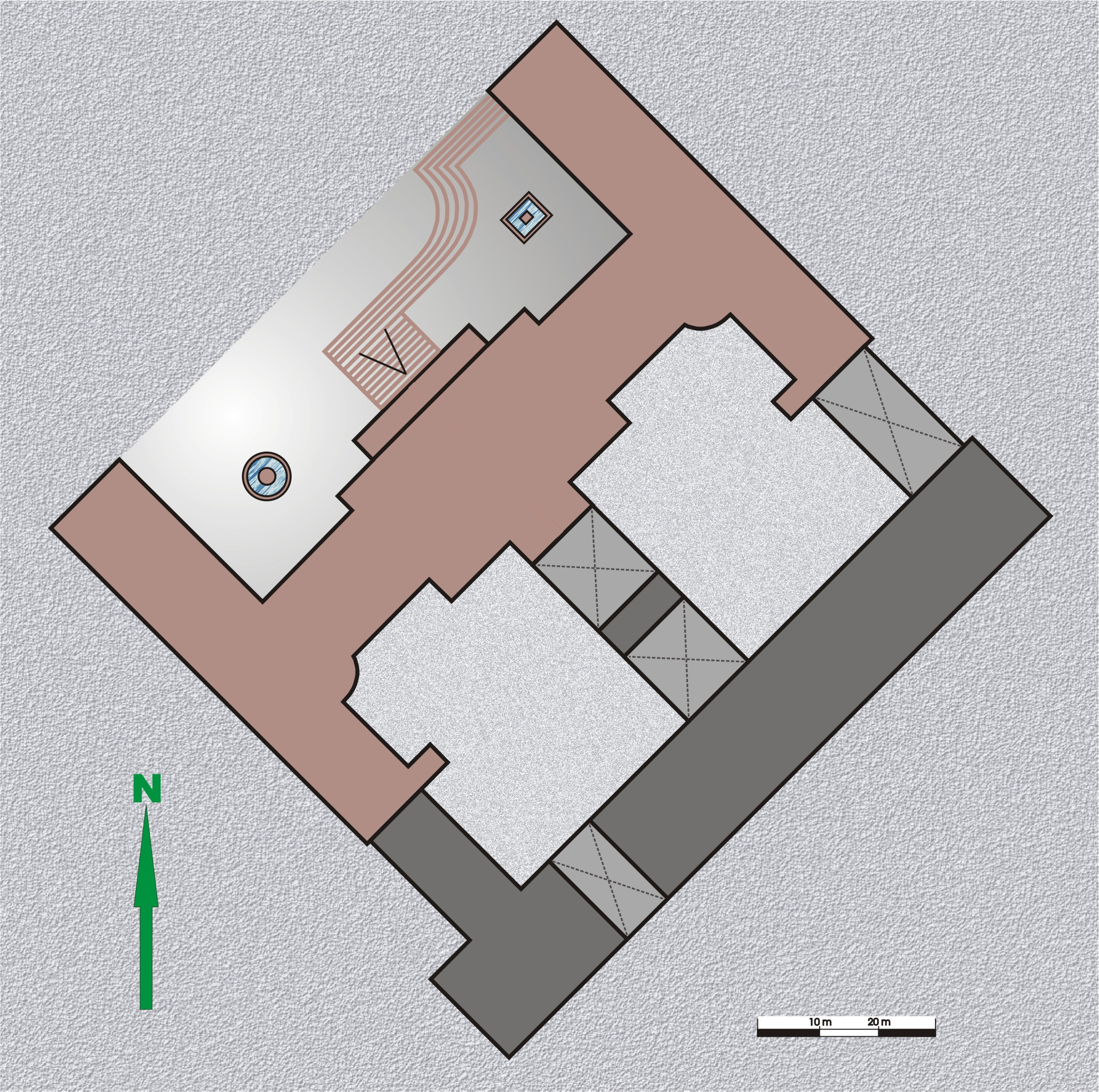 Grundriss des Rathauses in Kassel -Deutschland - Hessen